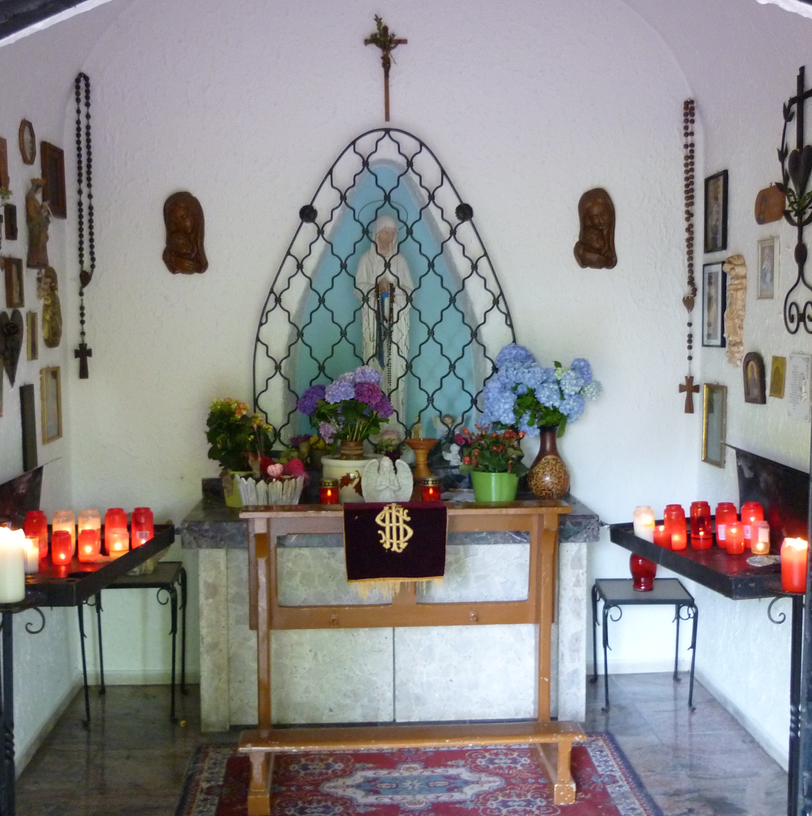 Dachsbergkapelle: Innenansicht